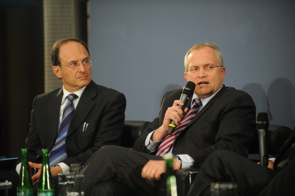 Dennis Snower (ifW) und Christoph M. Schmidt (RWI)